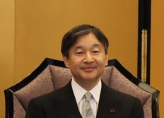 第75回日本芸術院授賞式にて